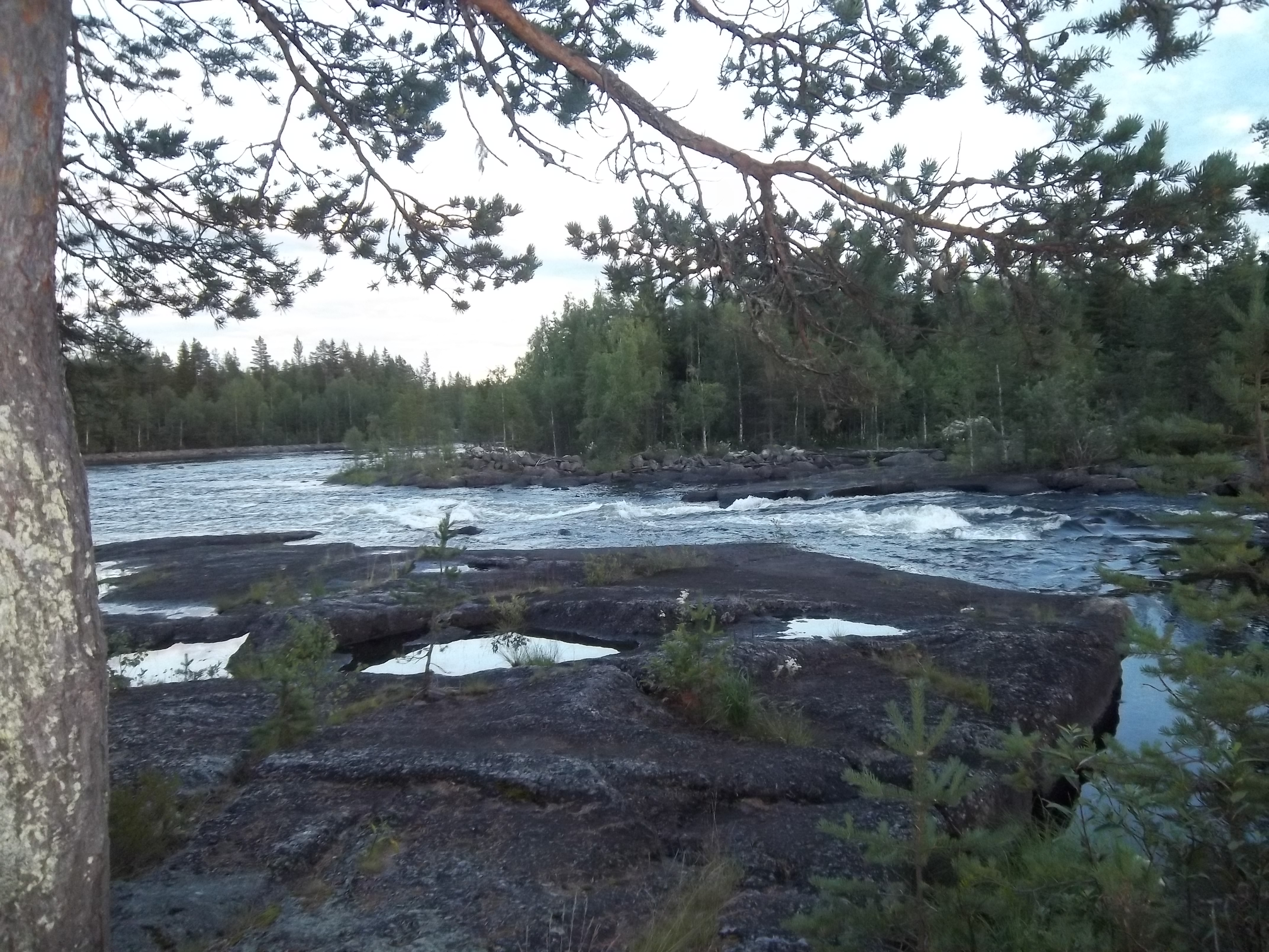 Ett av få orörda forspartier i Sverige finns i Vängelälven från Bofors till Forsås.